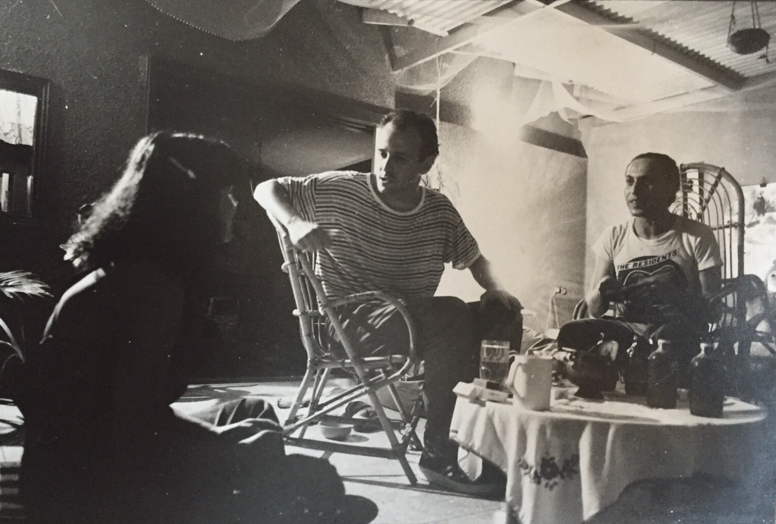 דורון אייל עם רמי פורטיס ורונה ורד